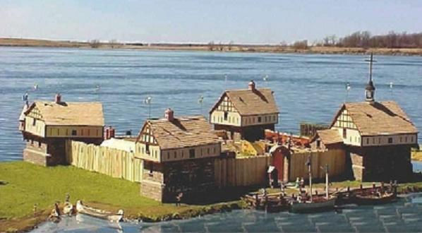 Modèle du Fort Beauharnois au musée de la civilisation à Québec